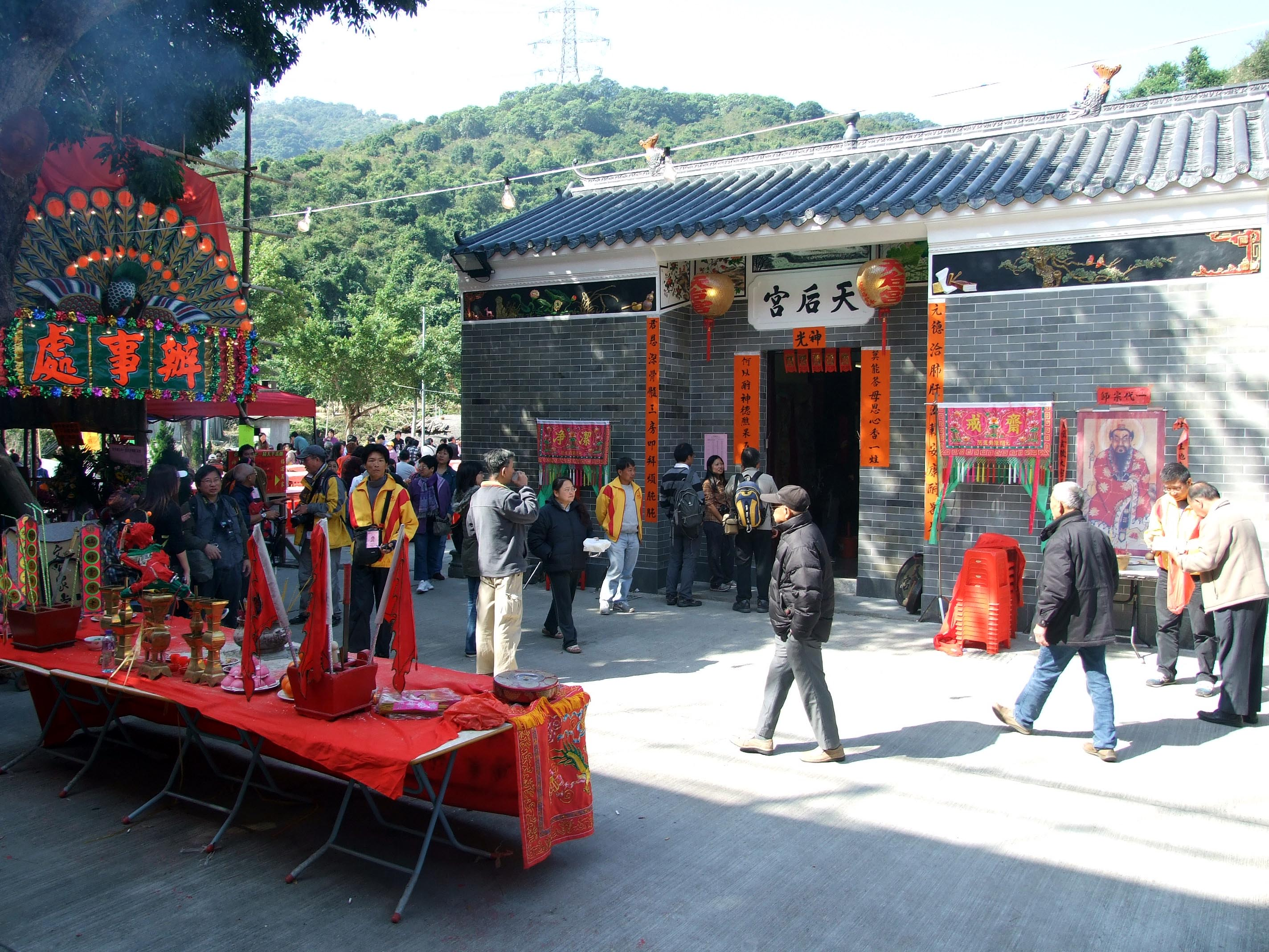 中文（香港）: 泰亨鄉庚寅年太平清醮